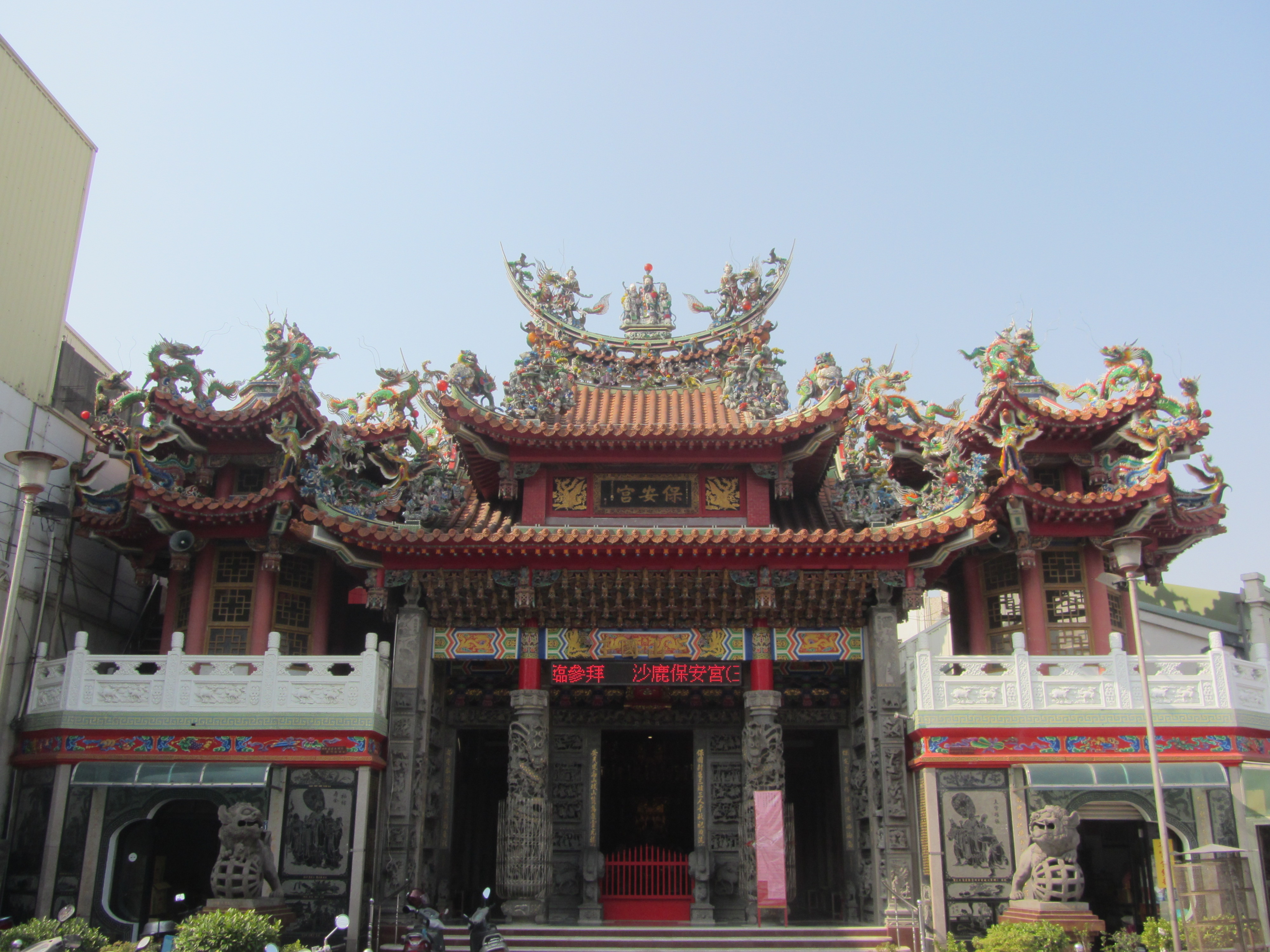 台中市沙鹿區保安宮